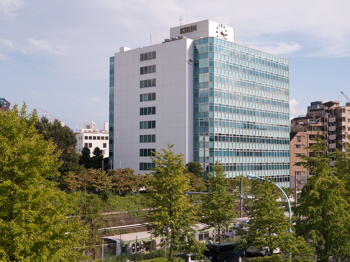 キリンビール本社、東京都渋谷区神宮前6丁目。